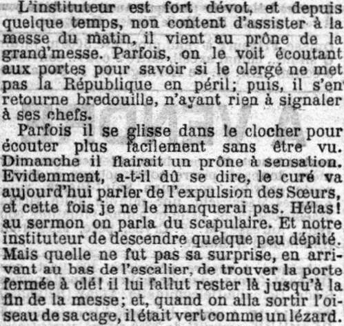 La mésaventure de l'instituteur public de Plouarzel le 30 juillet 1902 (journal La Croix citant Le Courrier du Finistère".